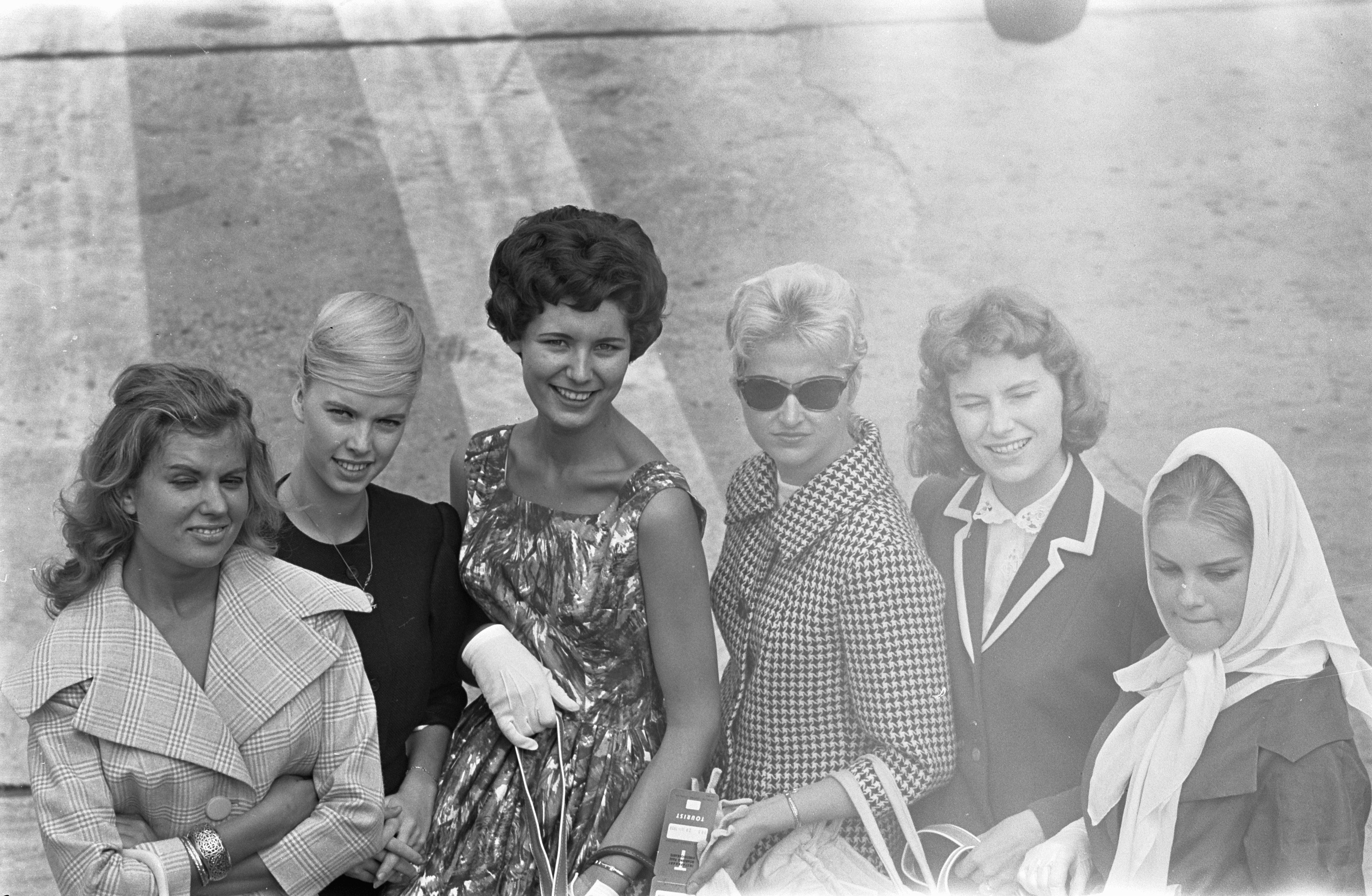 Collectie / Archief : Fotocollectie Anefo Reportage / Serie : [ onbekend ] Beschrijving : Vertrek naar Palermo van de schoonheidskoninginnen v.l.n.r. miss België (Michele Goethals?), miss Denemarken , miss Holland (Peggy Erwich), miss Luxemburg, miss IJsland, miss ... [TEKST NIET COMPLEET] Datum : 29 juli 1959 Trefwoorden : missverkiezingen, vrouwen Persoonsnaam : Erwich, Peggy Fotograaf : Pot, Harry / Anefo Auteursrechthebbende : Nationaal Archief Materiaalsoort : Negatief (zwart/wit) Nummer archiefinventaris : bekijk toegang 2.24.01.05 Bestanddeelnummer : 910-5577